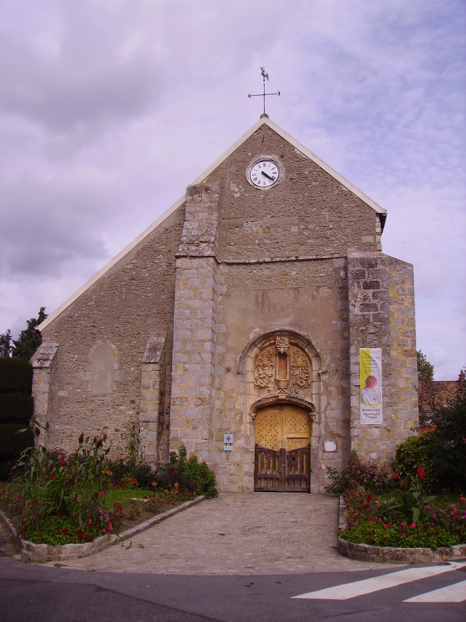 Eglise de la ville de Lisses (Essonne)